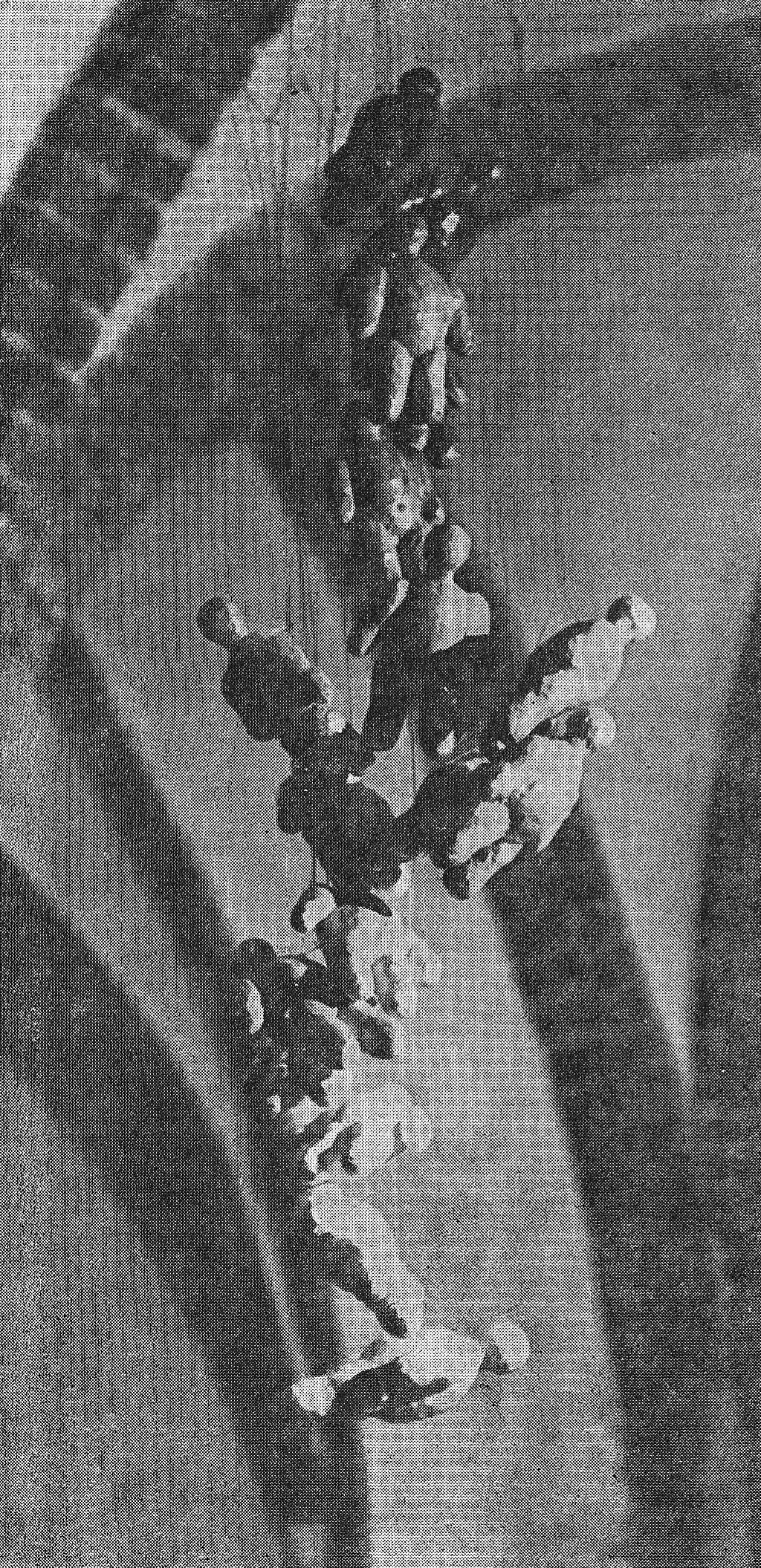 Makieta do projektu "Kompozycja przestrzenna" Anny Szpakowskiej-Kujawskiej z 1970 roku, zamieszczona w katalogu z 1983 roku. Reprodukcja makiety najprawdopodobniej Jan Bortkiewicz lub Michał Diament lub Zdzisław Holuka lub Czesław Żuk.